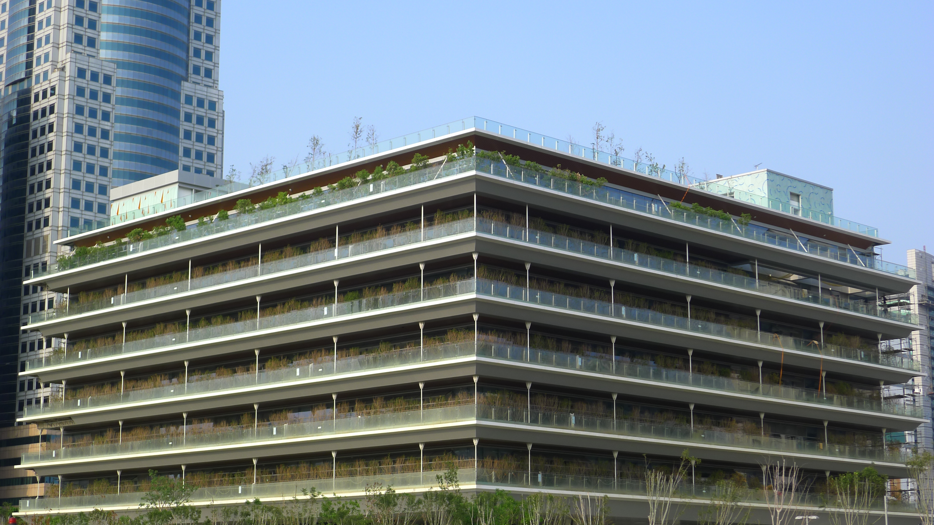 即將完工的高雄總圖書館